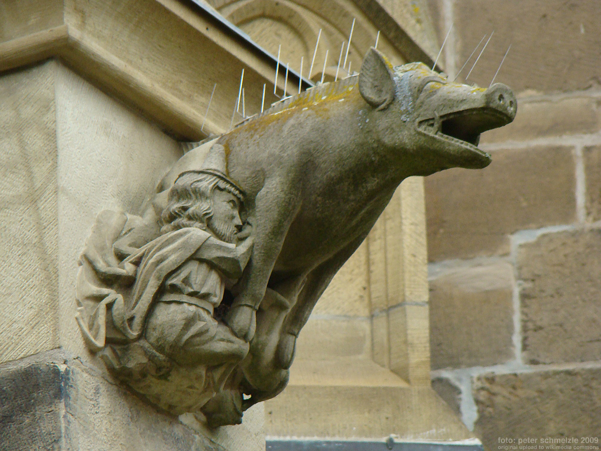 Judensau an der Stiftskirche in Bad Wimpfen